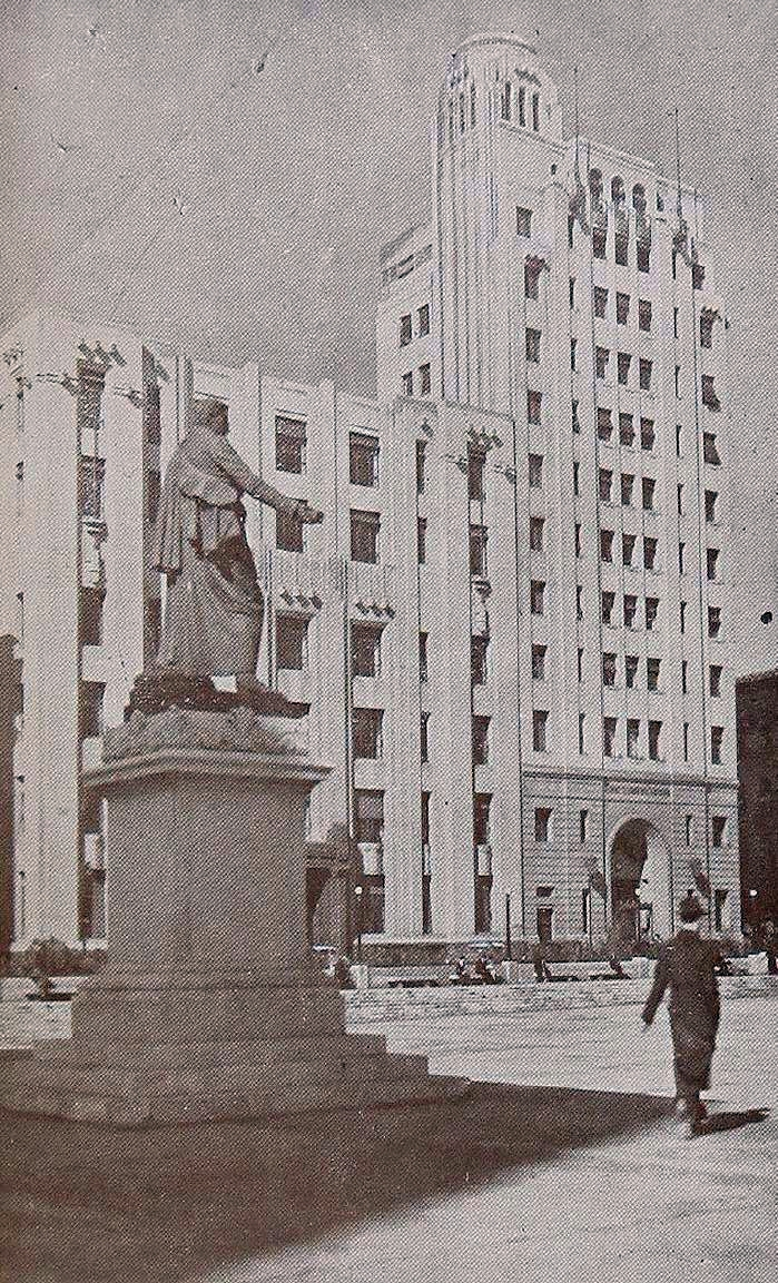 Plaza de la Constitución en Santiago de Chile (1938). En primer plano la estatua de Diego Portales, y a la derecha el Edificio del "Seguro Obrero"